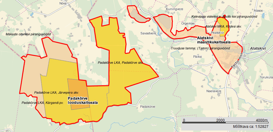 Padakõrve LKA ja Alatskivi MKA Maa-ameti kaardil.